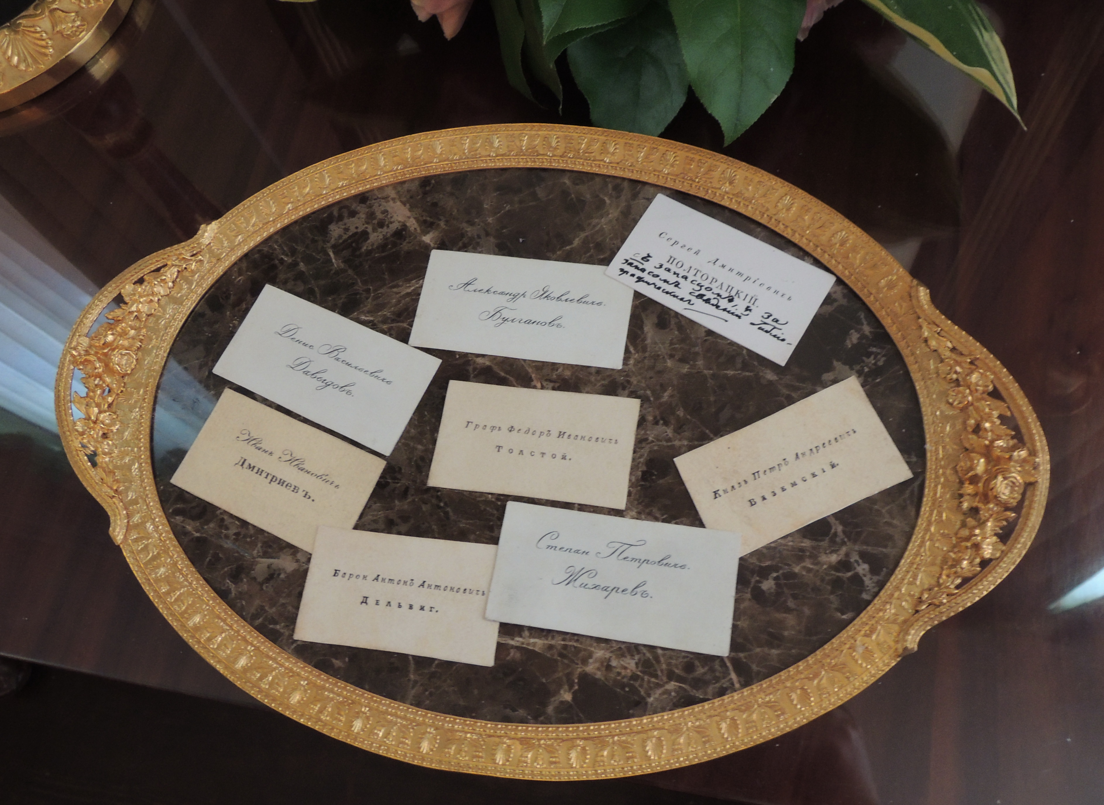 Дом-музей В. Л. Пушкина (филиал Государственного музея А. С. Пушкина) в день открытия 6 июня 2013 после масштабной реконструкции